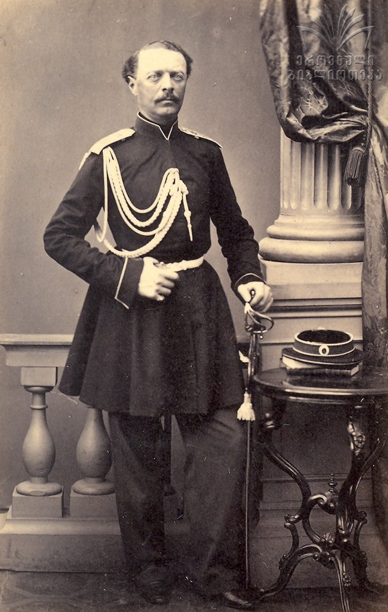 Константин Дадиани